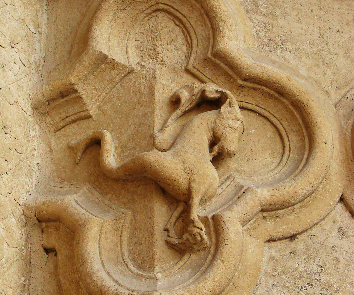 Le capricorne (Capricornus) ;un des signes du zodiaque complet figurant sur le portail gauche de la façade de la cathédrale d'Amiens.